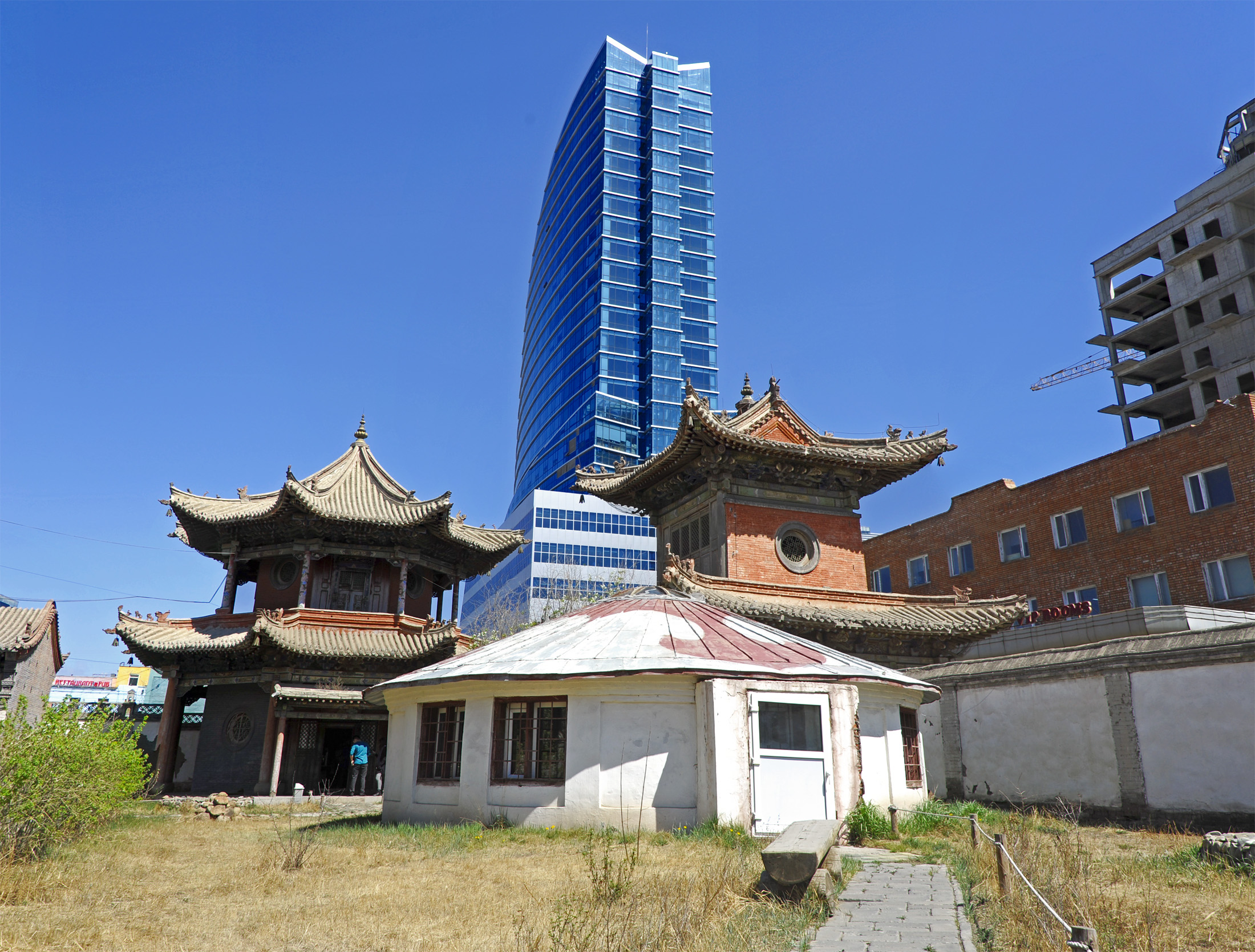 Ulan Bator, antichi templi soffocati e talvolta fagocitati dalle moderne costruzioni.